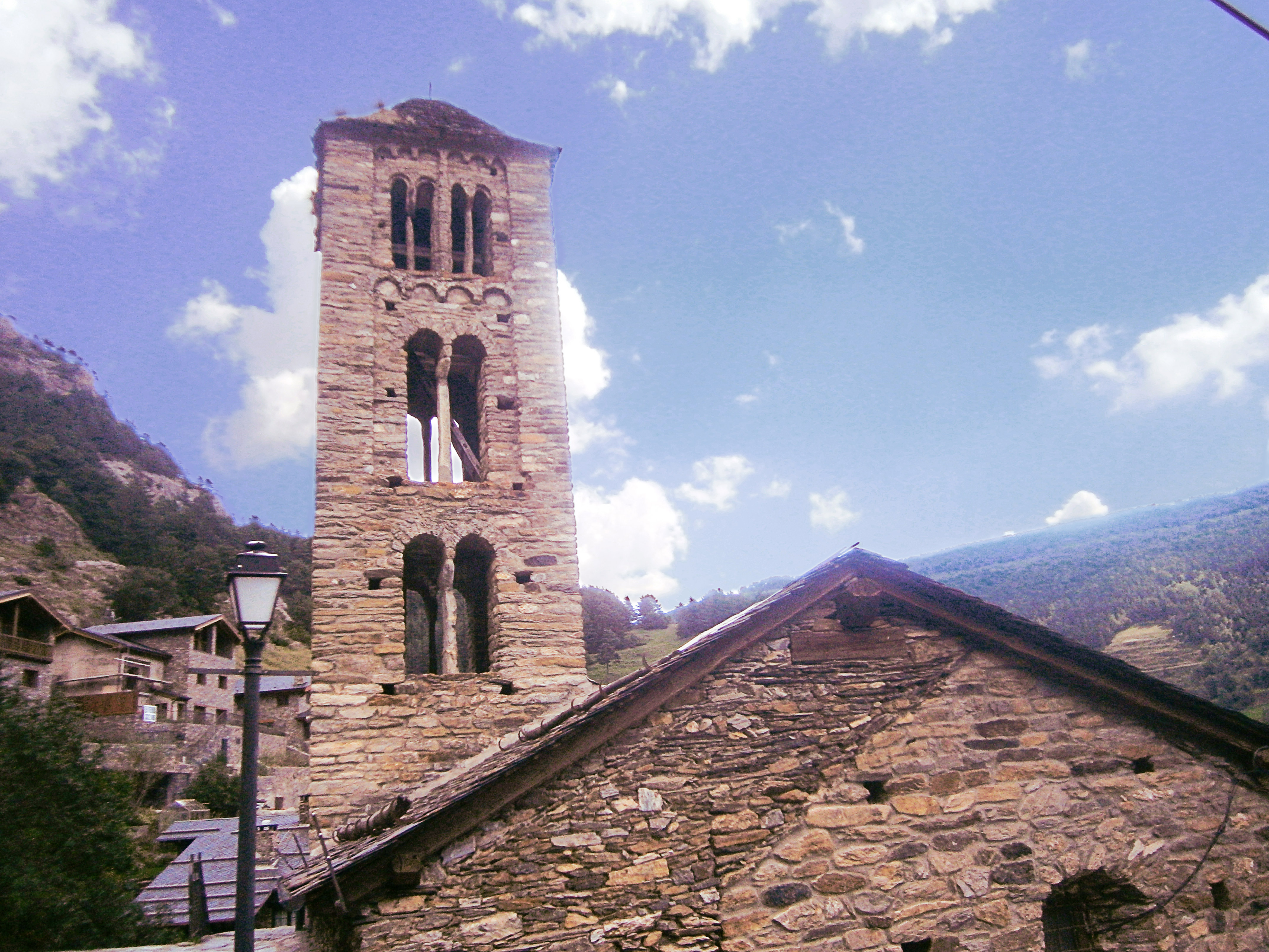 Església de Sant Climent de Pal a Pal, Ordino